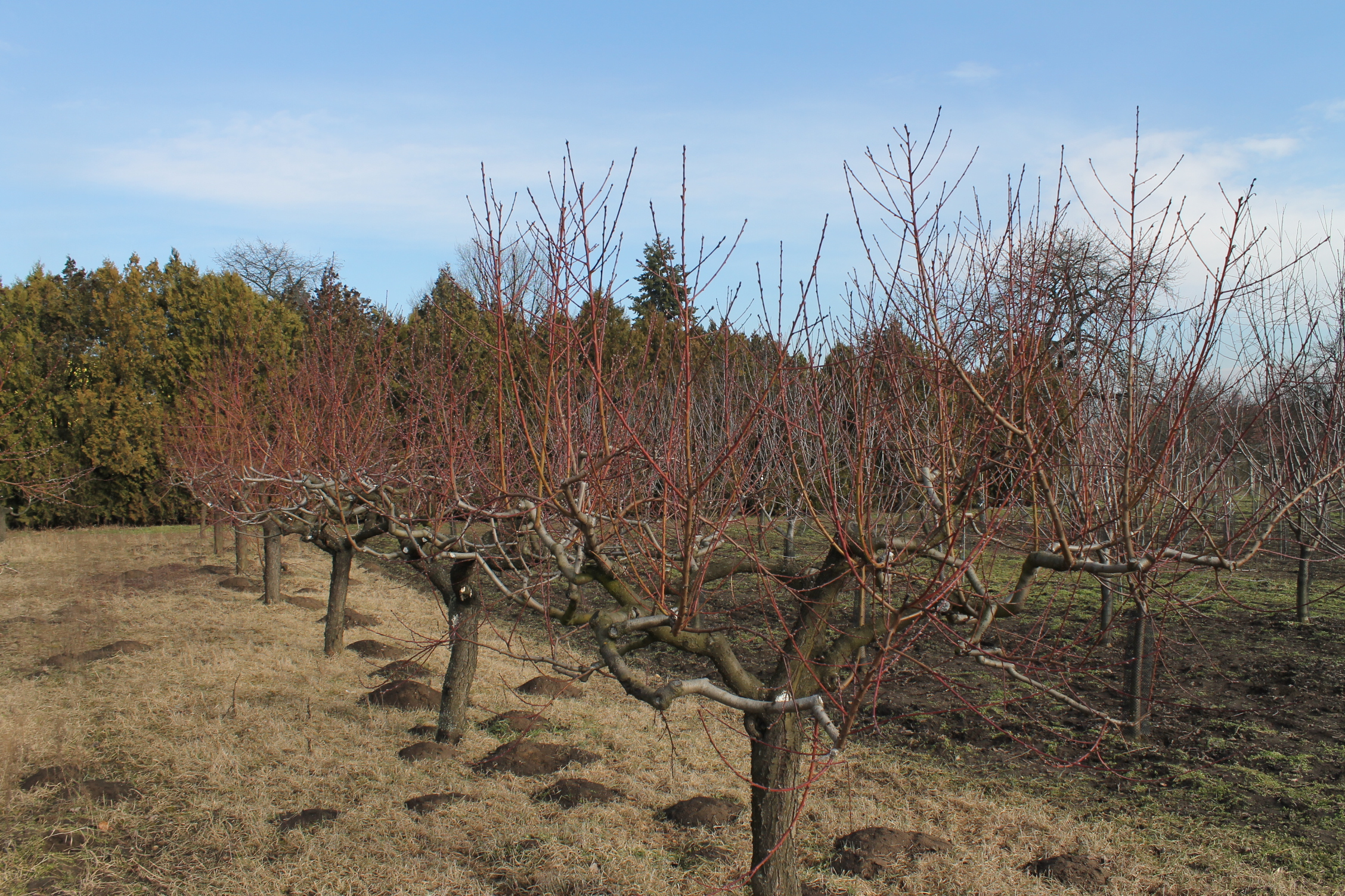 broskvový sad před řezem, únor, jih Moravy